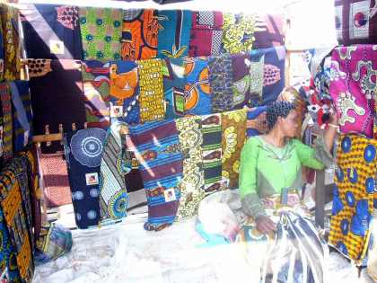 Zambia, Kitwe, Chisokonde Market